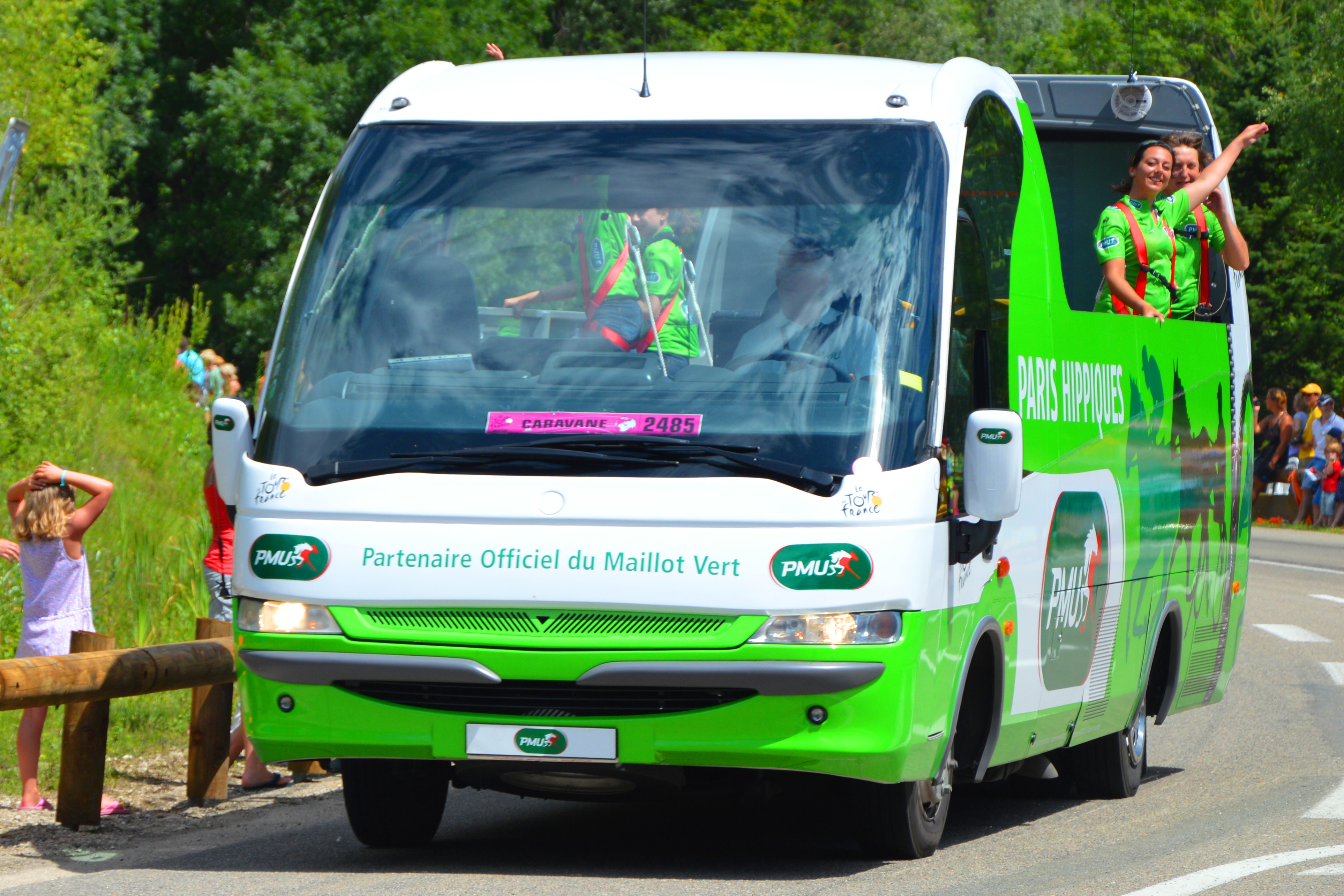 Caravane du Tour de France. Photo prise sur la D27 près du Lac de Chalain (Jura) pendant l' Etape 11 du Tour de France 2014.